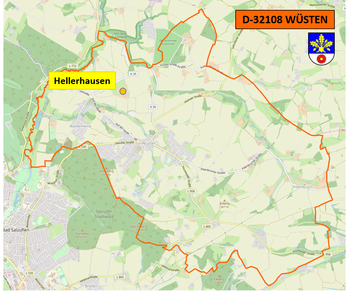 Deutschland (D) - Nordrhein-Westfalen (NW) - Kreis Lippe (LIP) - Bad Salzuflen - Wüsten: Ortsteil 'Hellerhausen', Lage im Ortsgebiet